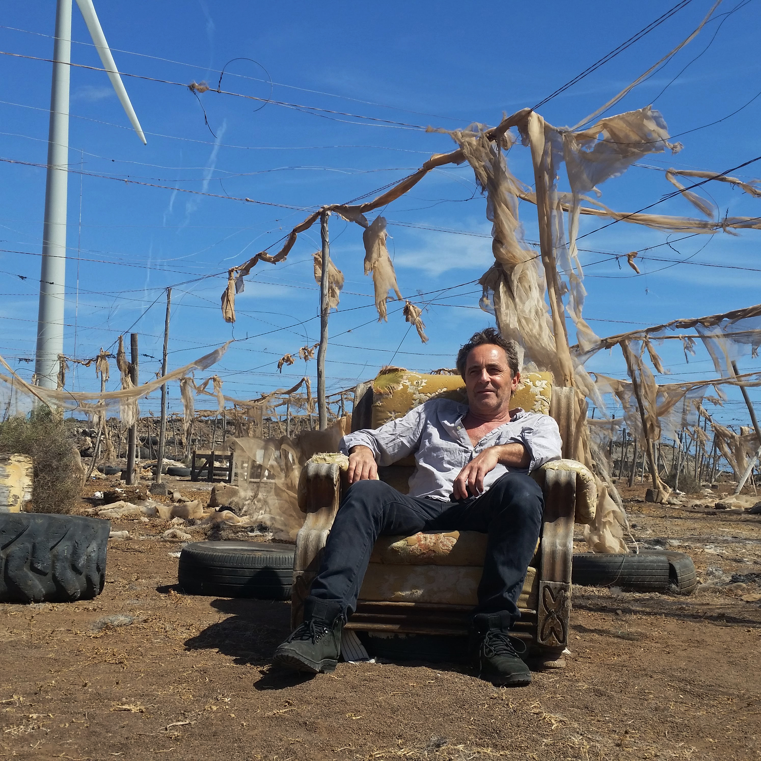 Foto: Veruschka Bohn